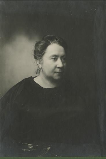 Eloísa Díaz Insunza (* Santiago de Chile, Chile, 25 de junio de 1866, íd. 1 de noviembre de 1950) fue la primera mujer estudiante de medicina de la Universidad de Chile y la primera médica de Chile y América del Sur.